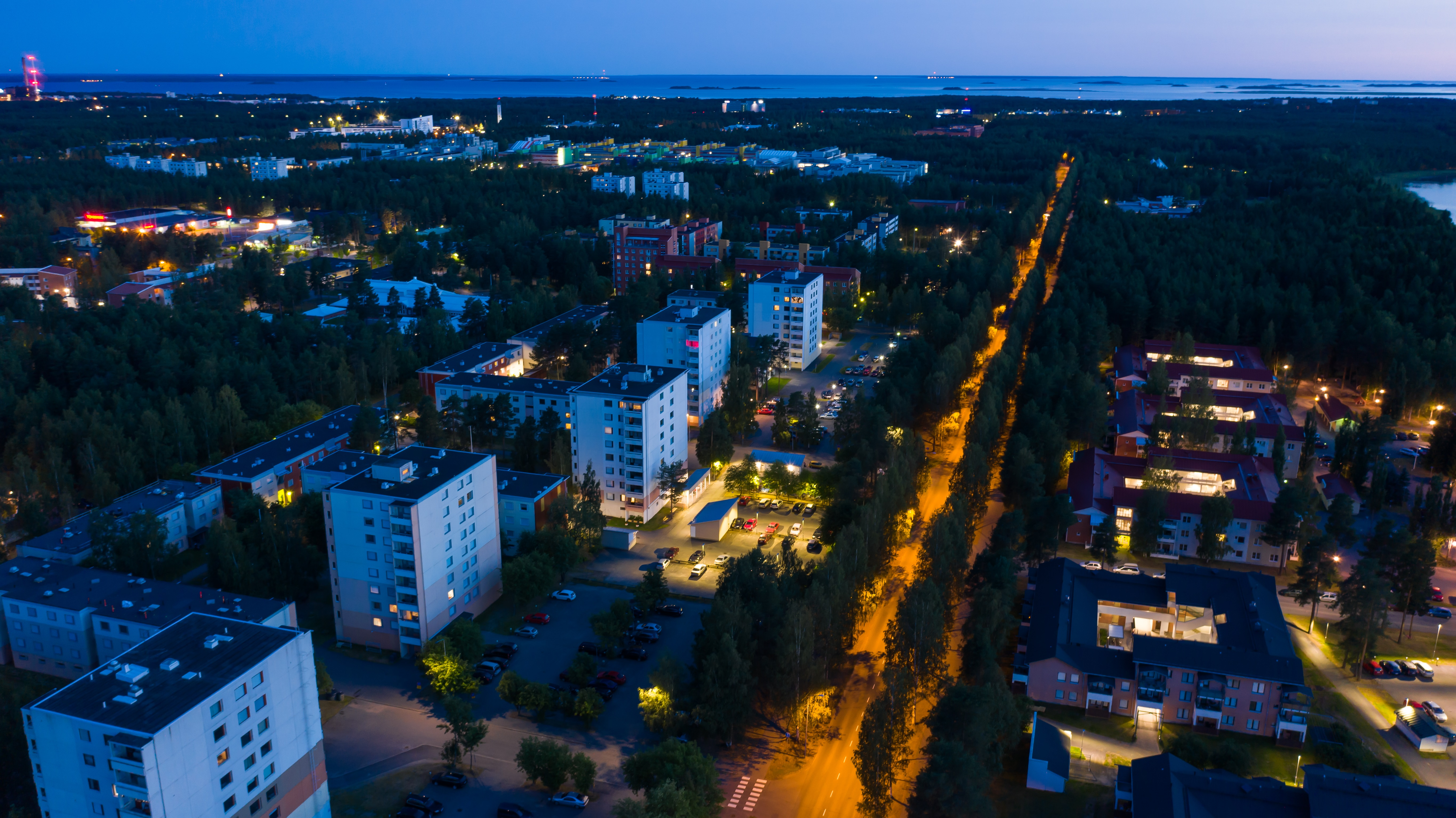 Kaijonharjusta kuva elokuussa 2019.